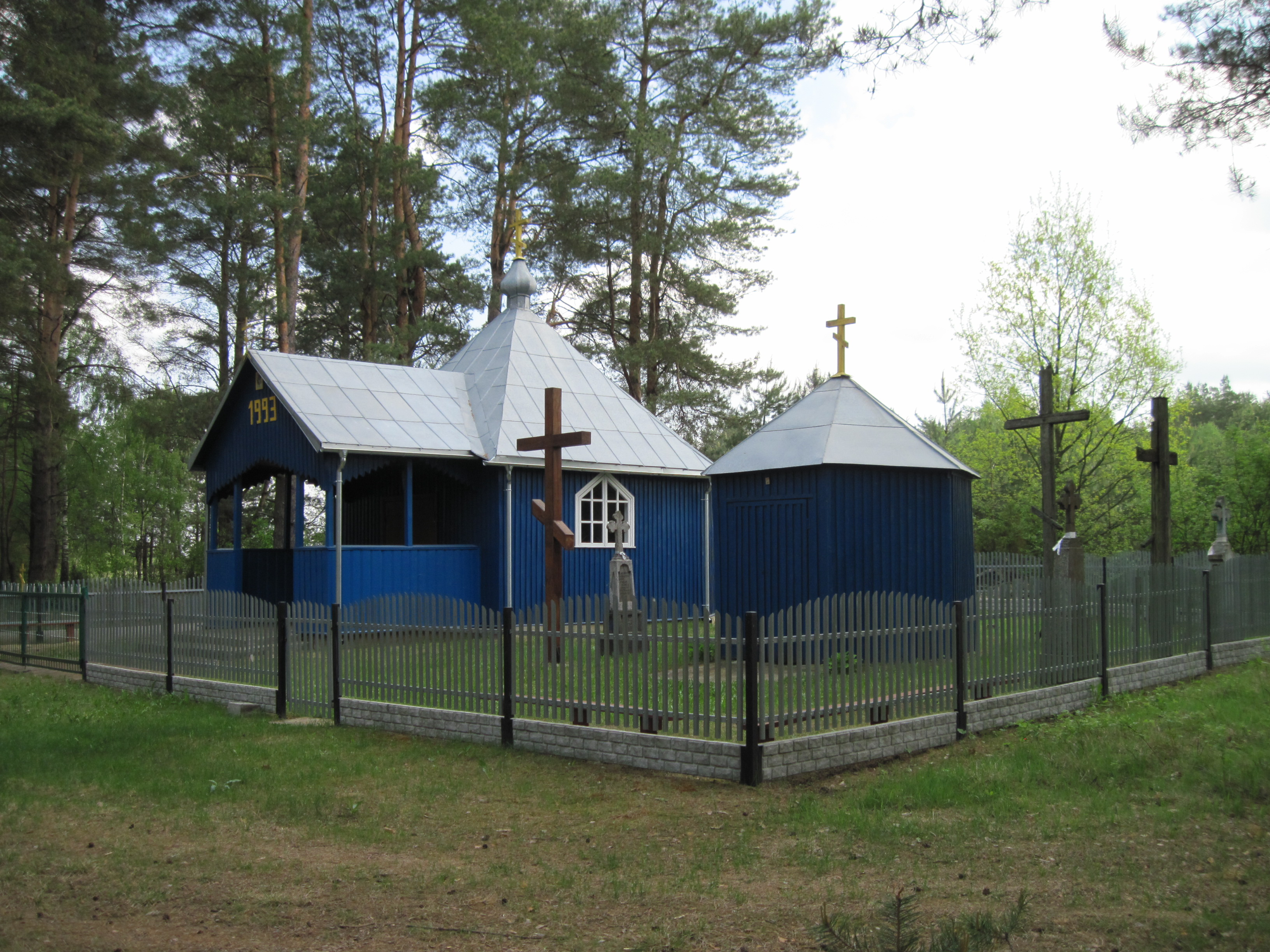 Gredele